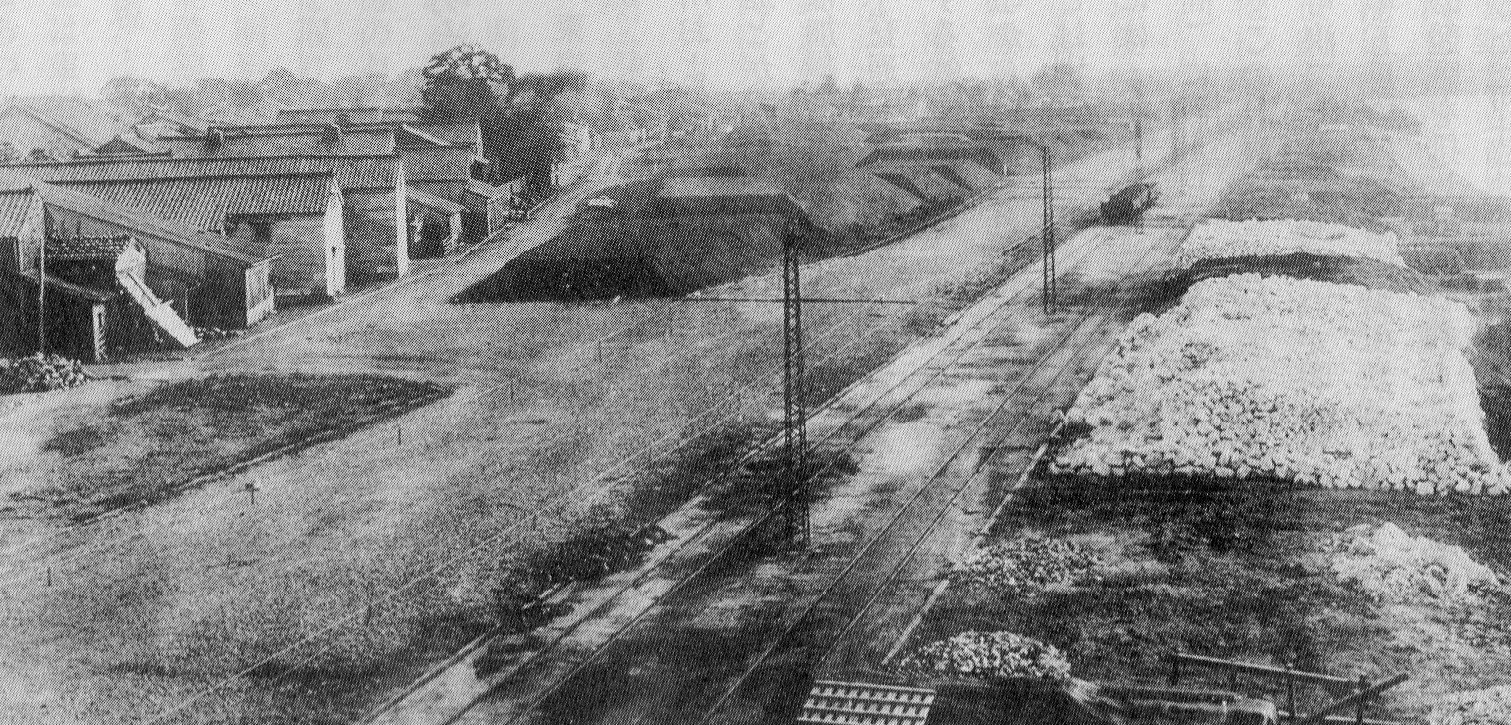 運河線の様子。写真説明には「東岩瀬港野積場ノ一部」とある。（富山県東岩瀬町役場、『東岩瀬港 昭和十四年度版』、1939年（昭和14年）6月、富山県東岩瀬町役場）